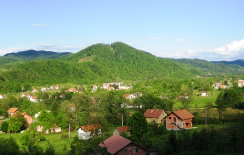 Hrvatski kraj Studenci u dolini rijeke Usore.